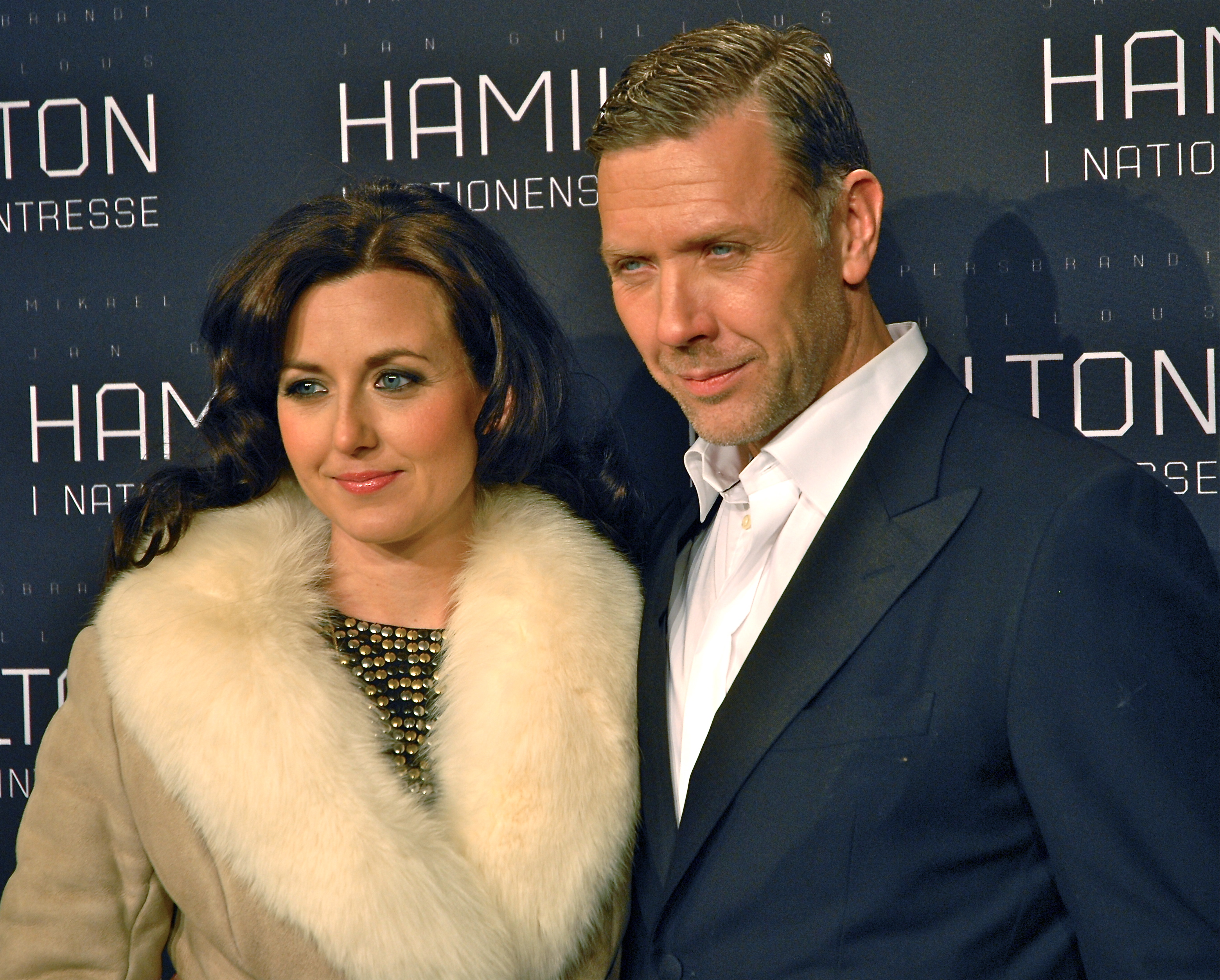 Sanna Lundell och Mikael Persbrandt på galapremiären av Hamilton - I nationens intresse, på biograf Sergel i Stockholm den 9 januari 2012.